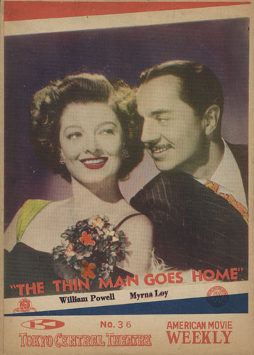 『アメリカンムービーウイークリー』 No.36(東京セントラル劇場週報)、1951年2月14日